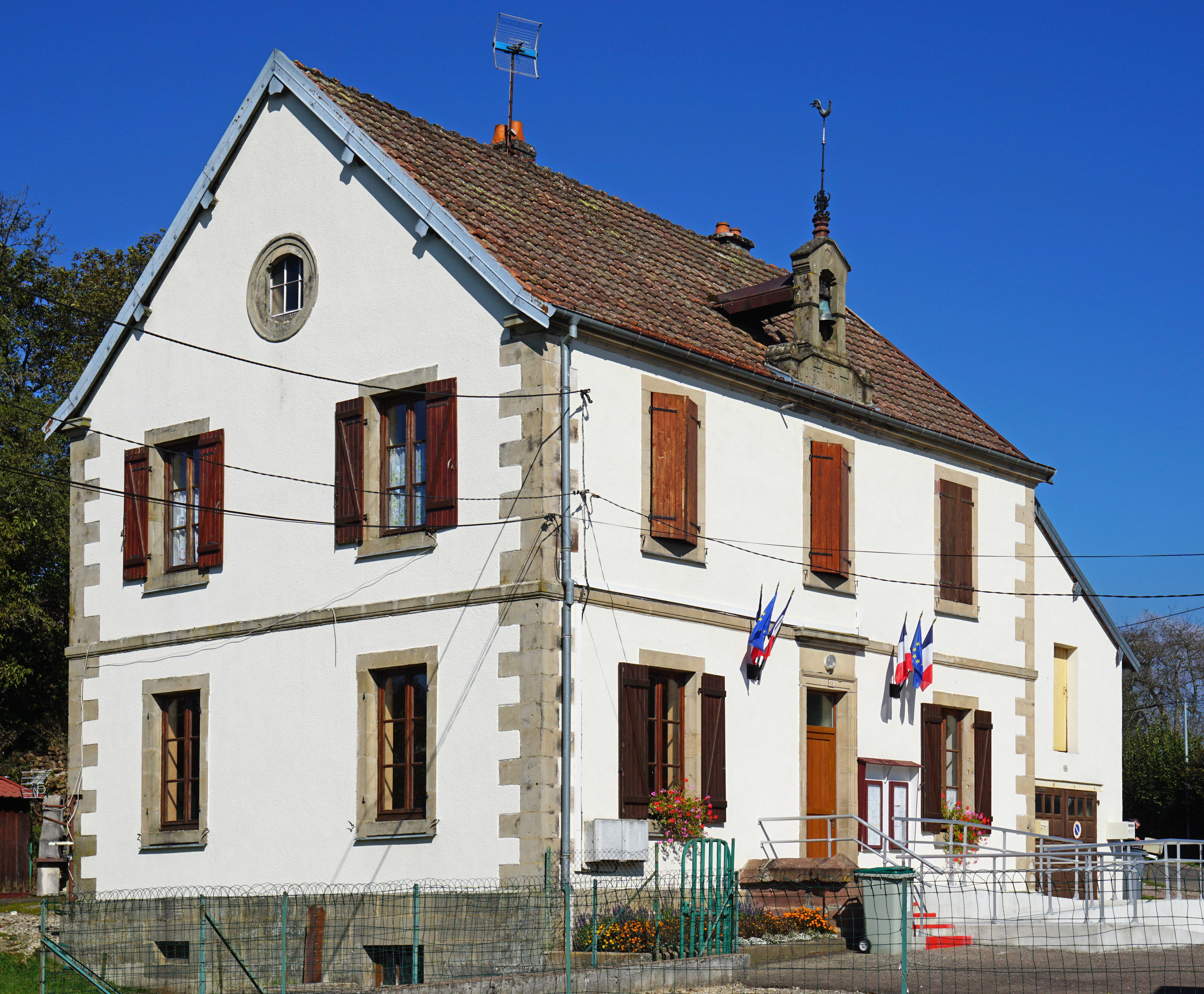 Mairie de Palante.